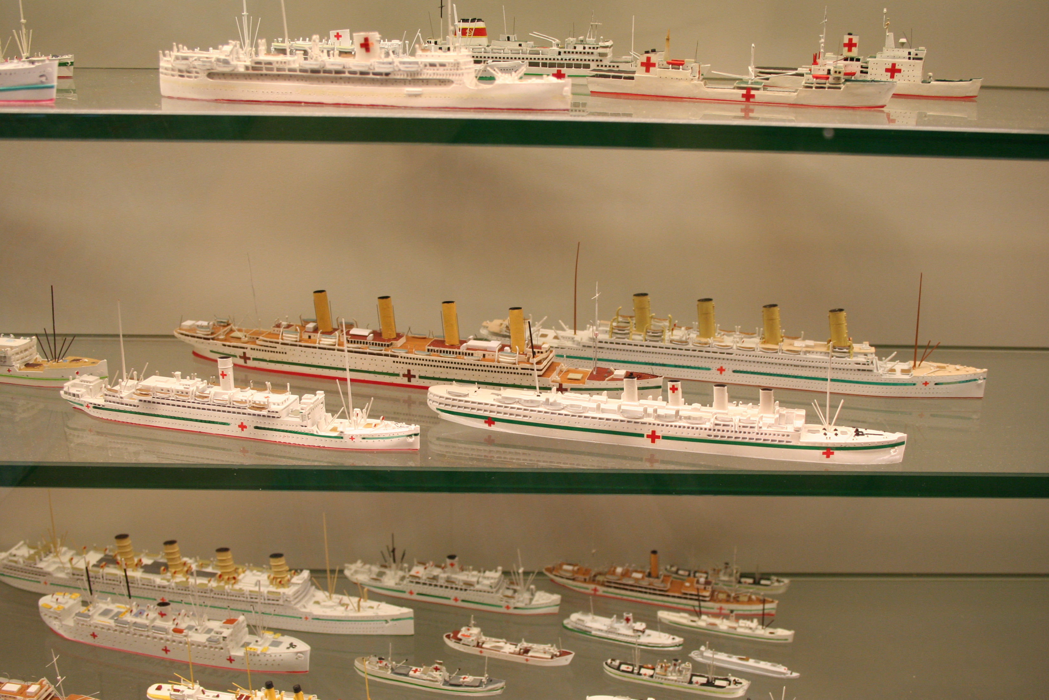 Hospital ship Models